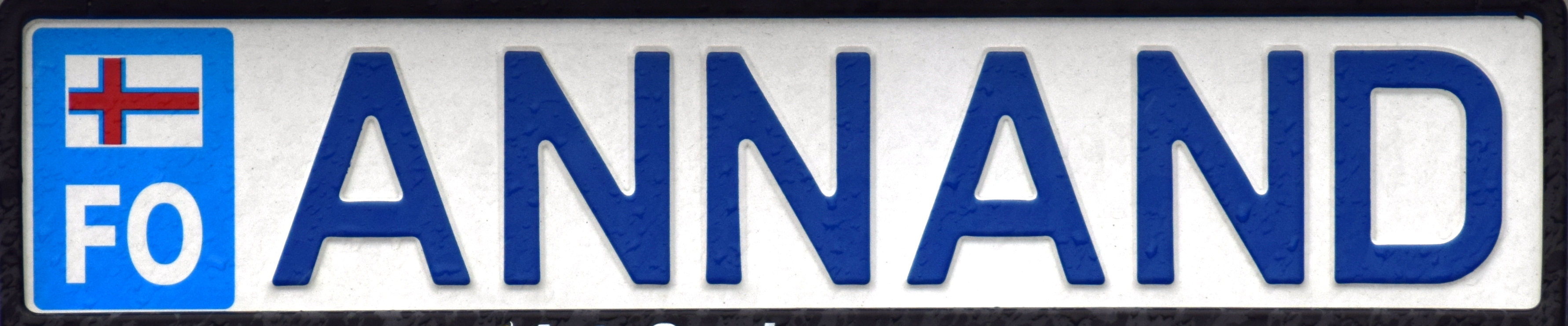 Faeröer persoonlijk kentekenplaat